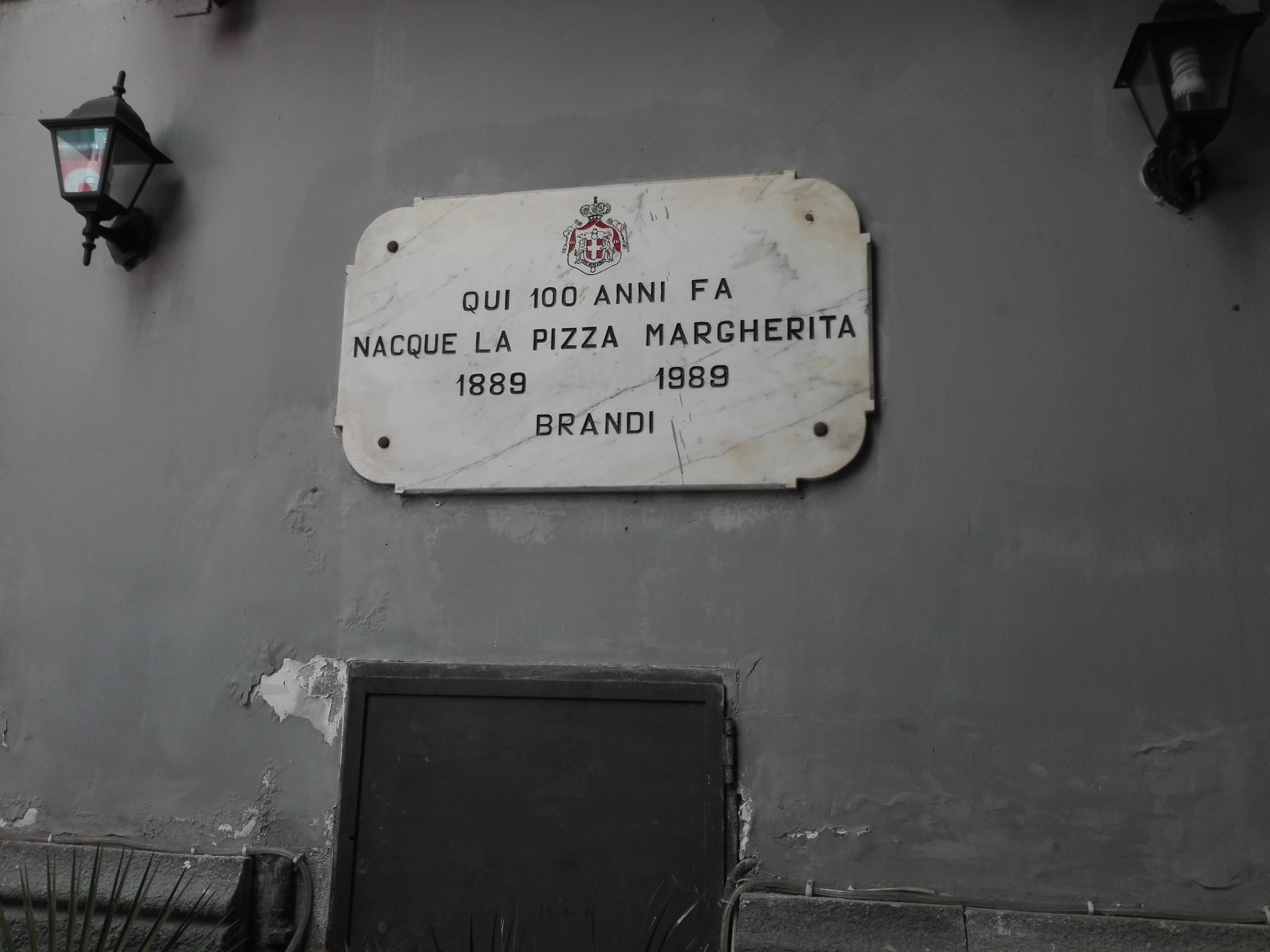 Lavagna del 1989 che incide i 100 anni dalla creazione della pizza margherita (1889-1989)